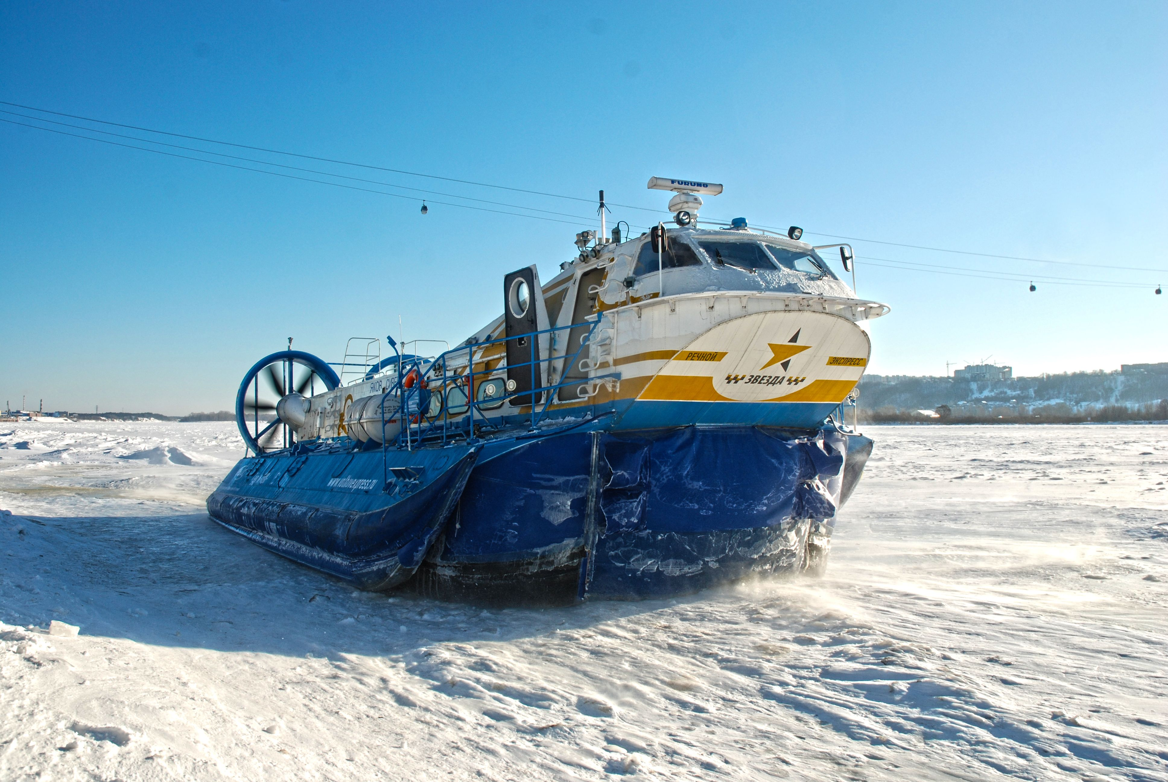 Судно на воздушной подушке Хивус-48 "Яков Сиверс". СВП работает в качестве пассажирского судна на переправе между городами Нижний Новгород - Бор.